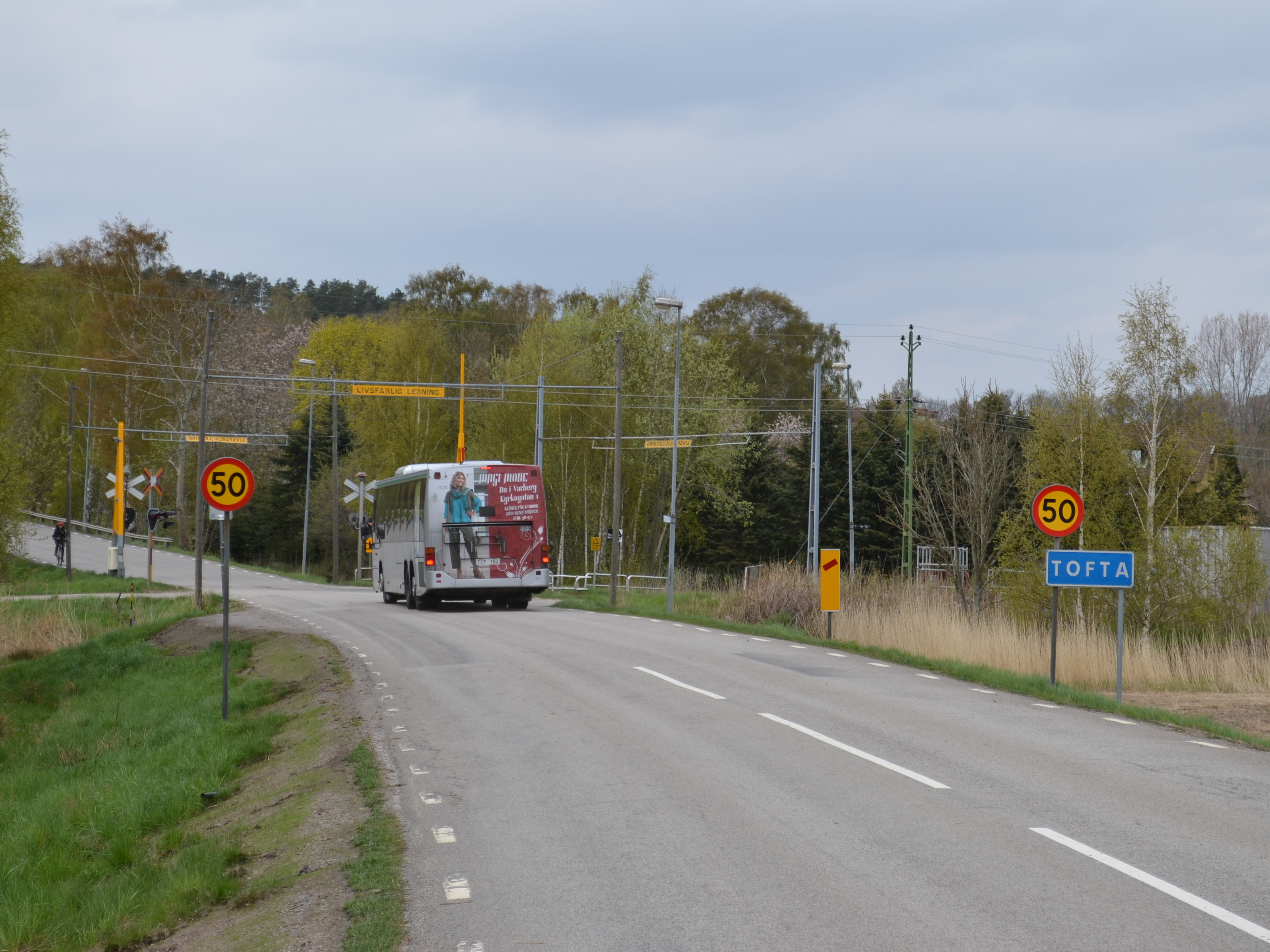 Tofta, Varbergs kommun.